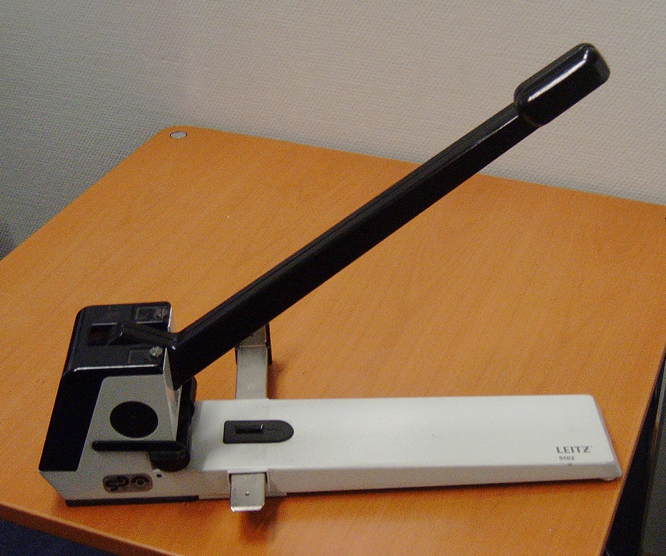 Bildinhalt: Locher für dicke Stapel Aufnahmeort: Frankfurt am Main, Deutschland